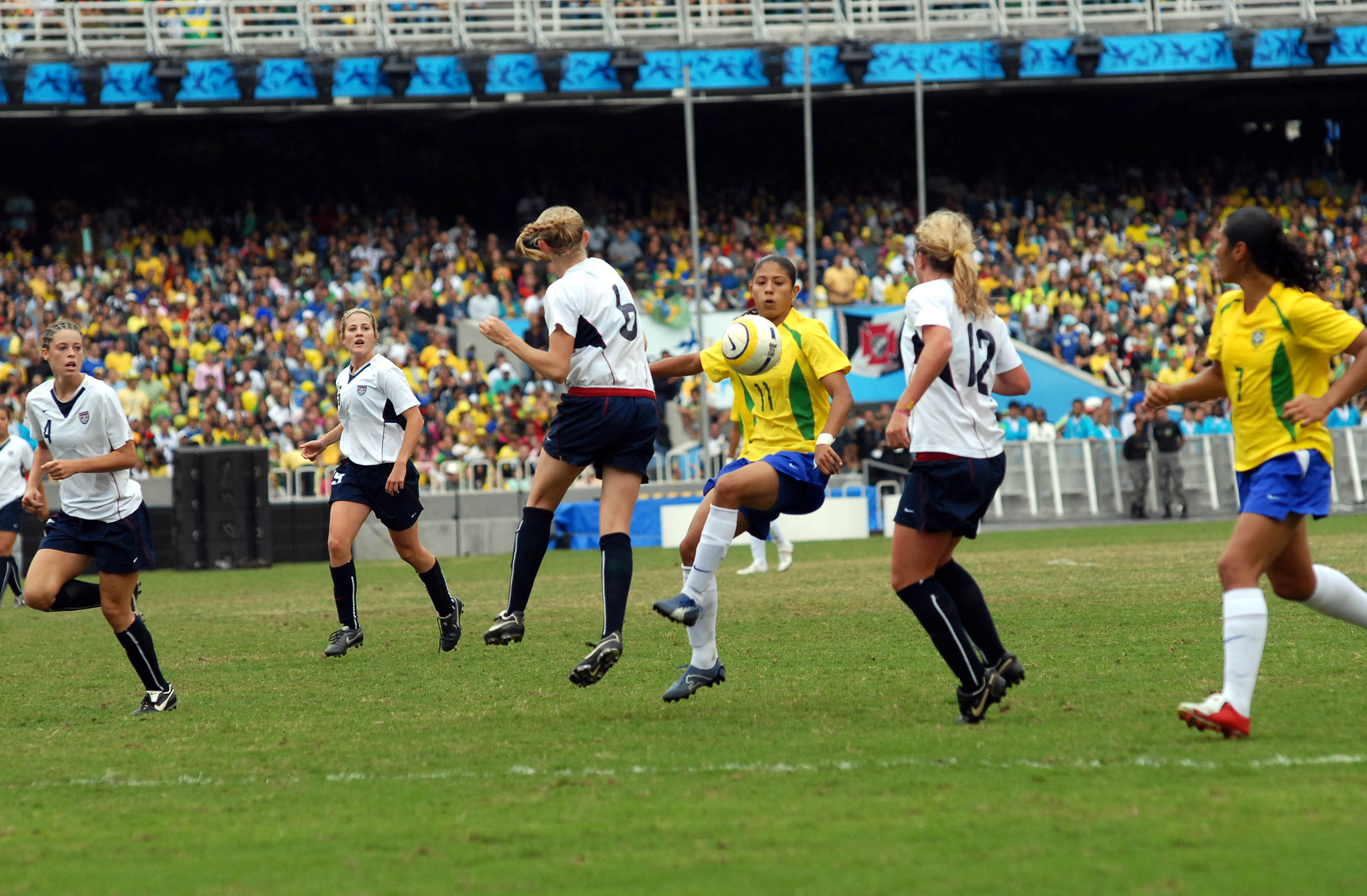 Rio de Janeiro - Equipe brasileira de futebol feminino ganha medalha de ouro nos jogos Pan-americanos do Rio de Janeiro, após vitória de 5 a 0 sobre a equipe dos Estados Unidos Foto: Wilson Dias/ABr